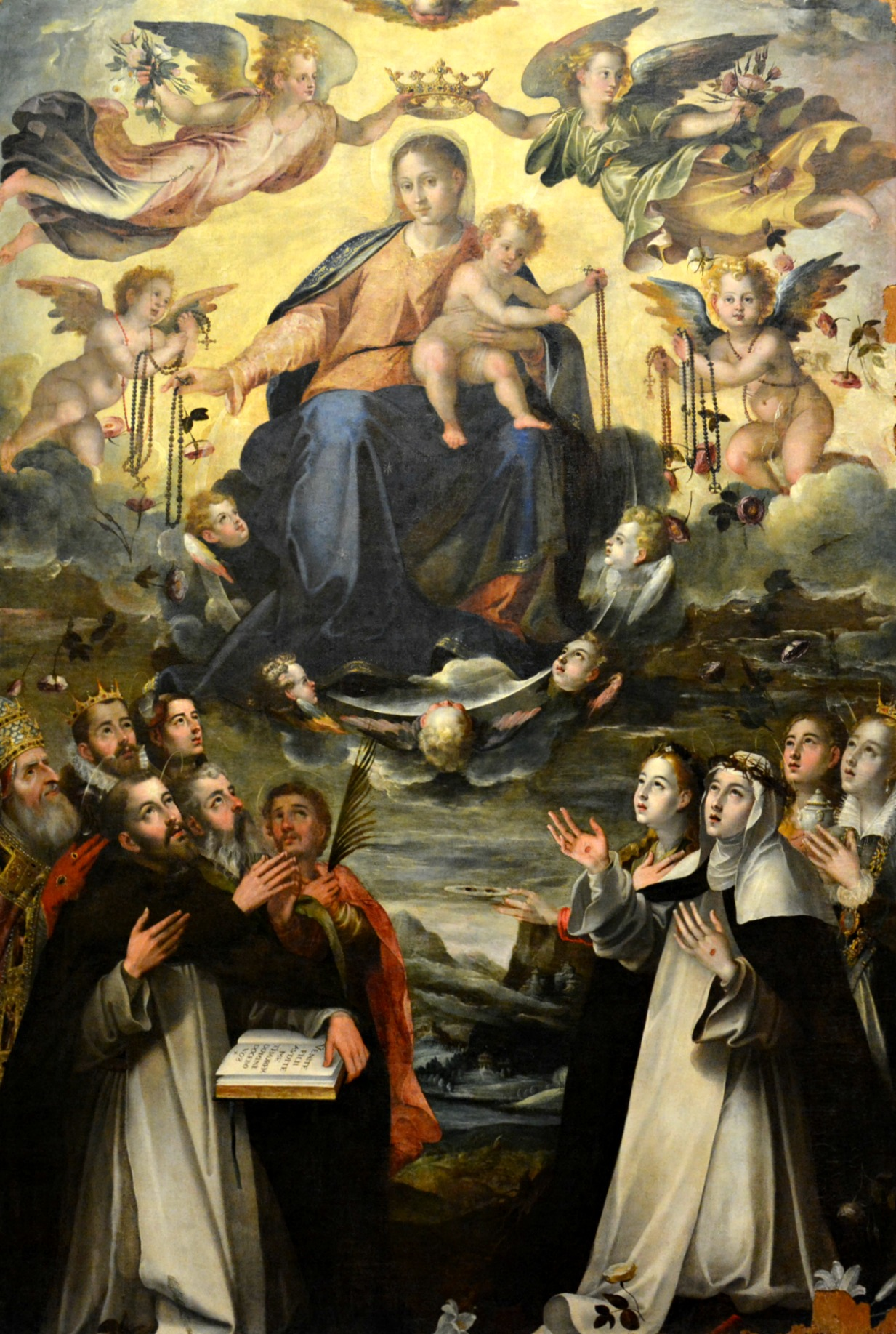 Vedi titolo